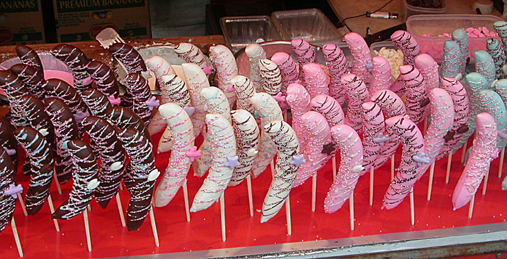 撮影者：小太刀 屋台で売られていた色とりどりのチョコバナナ